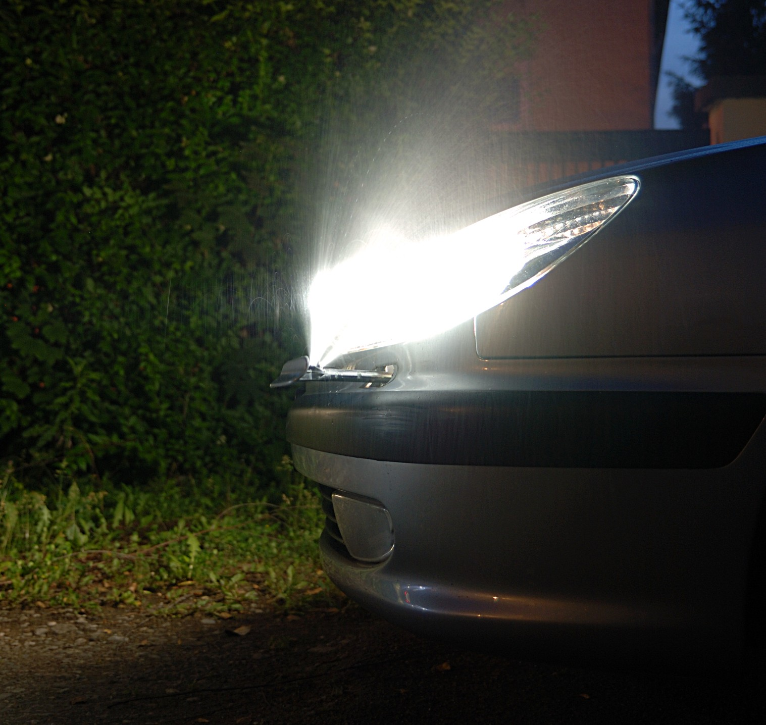 Scheibenwaschanlage bei Xenonscheinwerfern